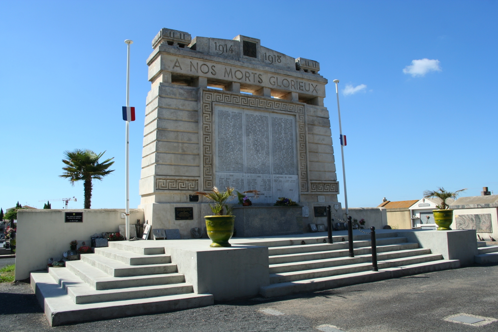 Monuments aux morts d'Agde (Hérault - France)